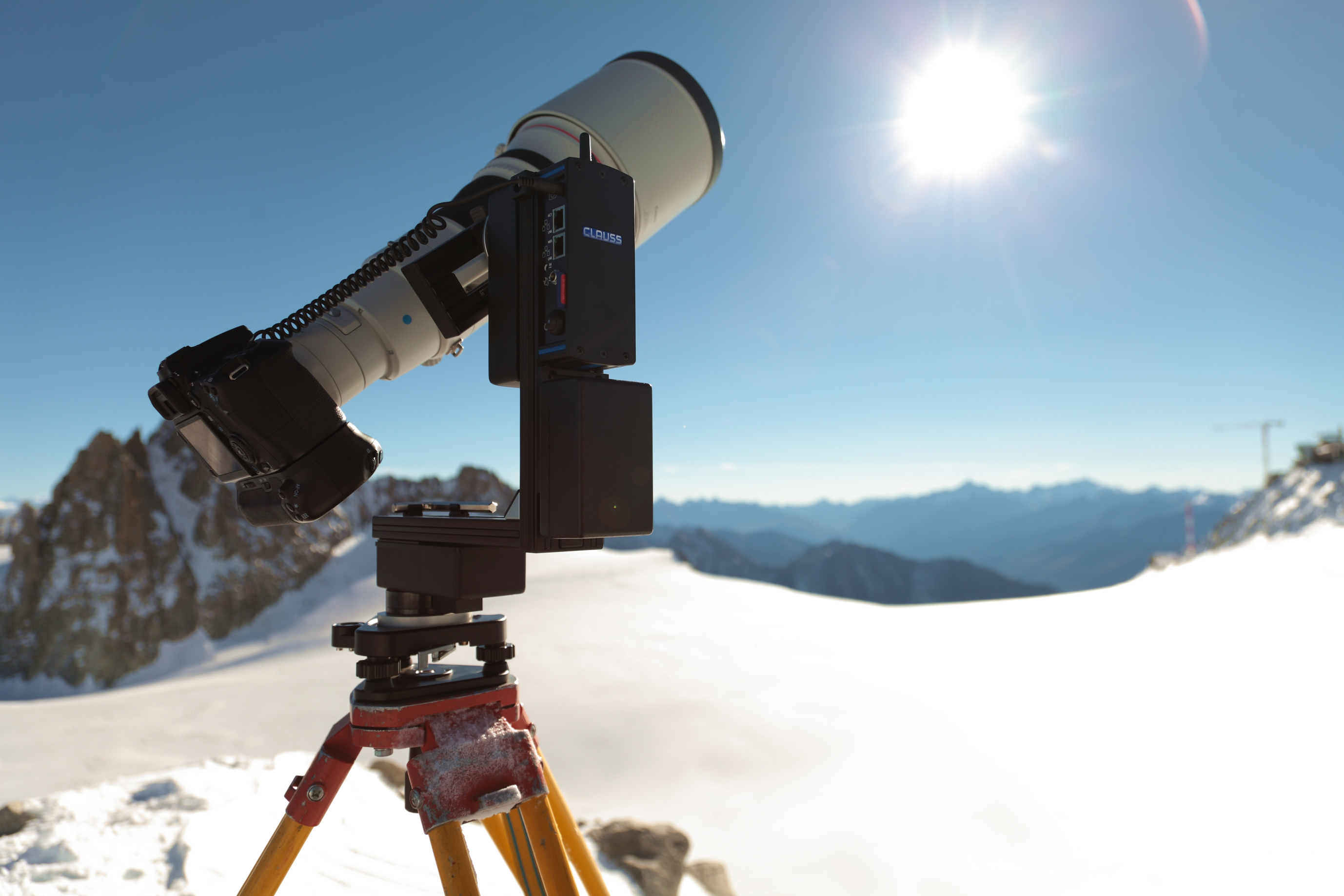 Dieses Foto zeigt den Panoramaroboter RODEON piXpert von CLAUSS während der Aufnahme des weltweit größten Gigapixelpanoramas des Mont Blanc 2014.